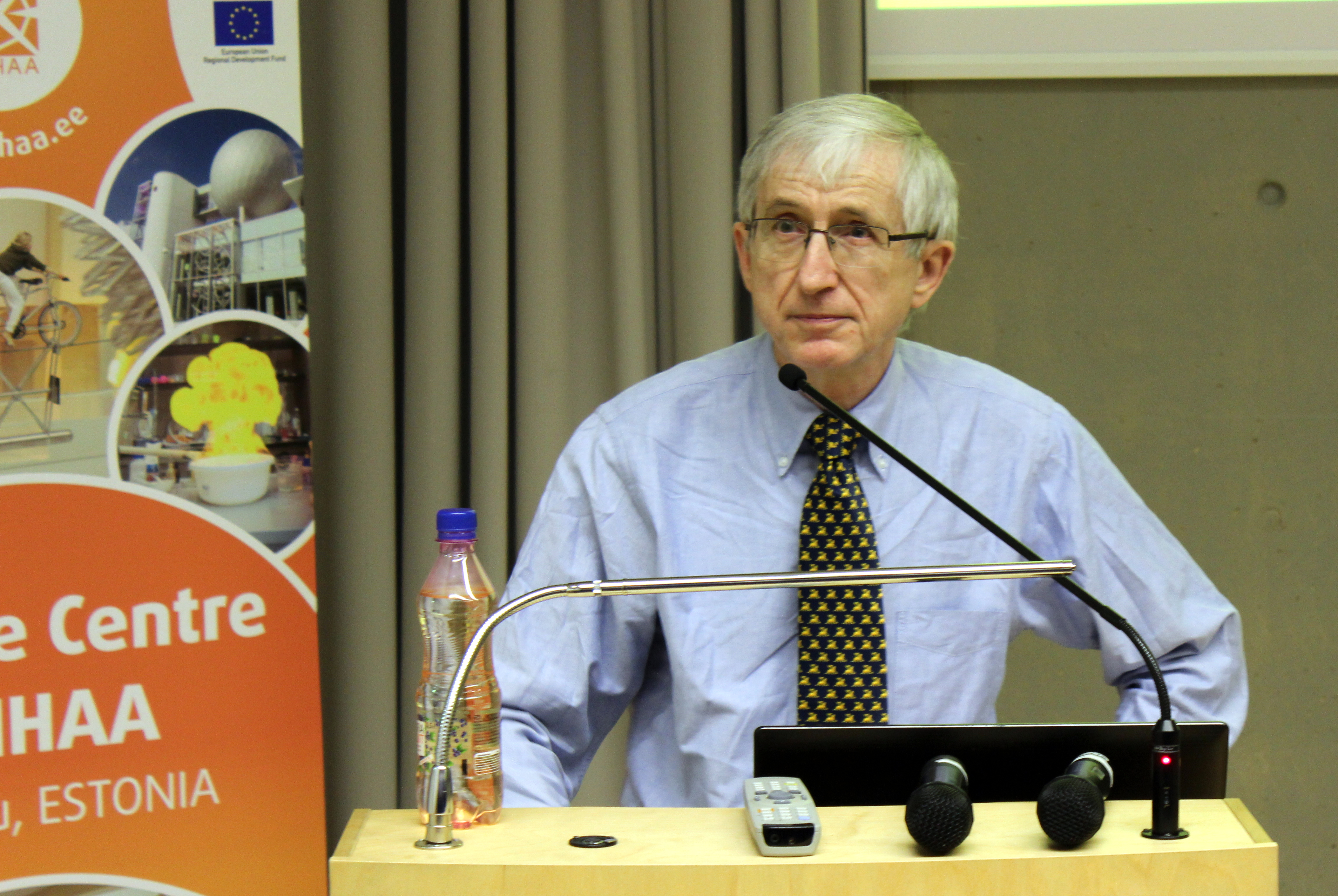 Jenik Radon Mõtlemiskonverentsil AHHAA keskuses.